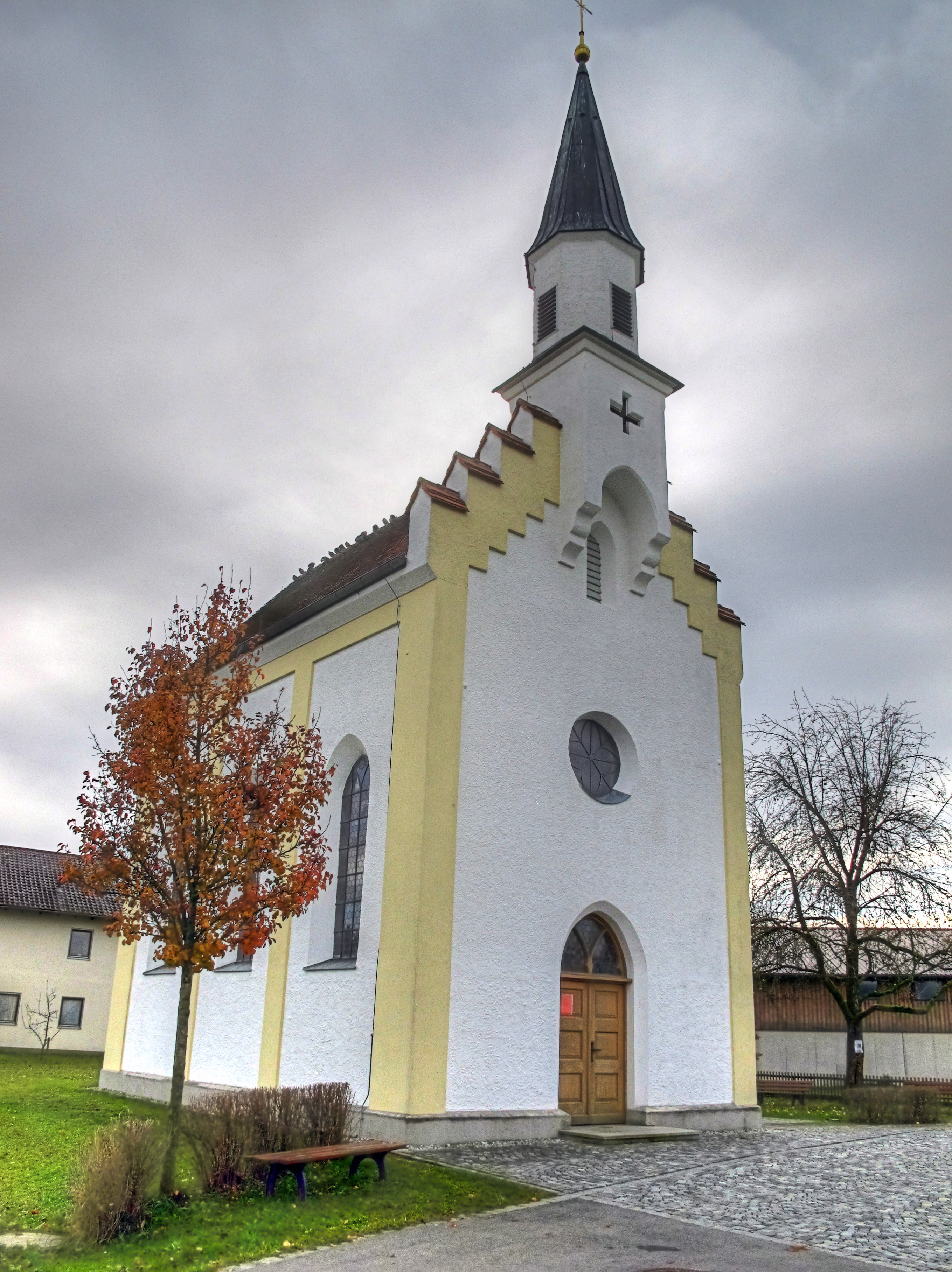 Deutschland, Bayern, Landkreis Starnberg, Gemeinde Gilching, Ortsteil Geisenbrunn, Mariä Heimsuchung, im Kapellenweg This is a photograph of an architectural monument.